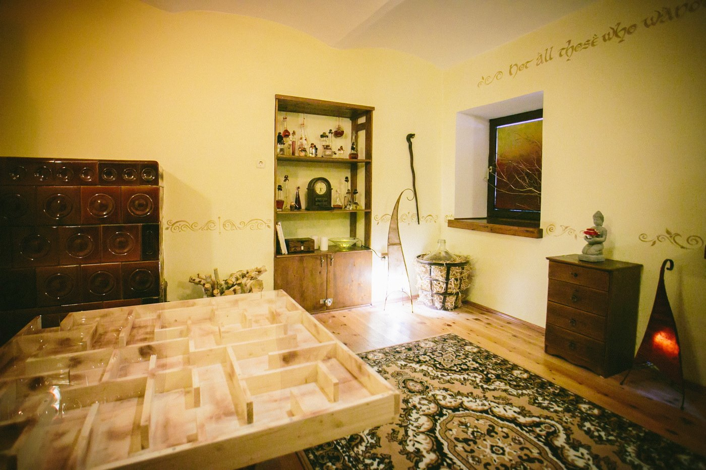 Soba pobega Bled